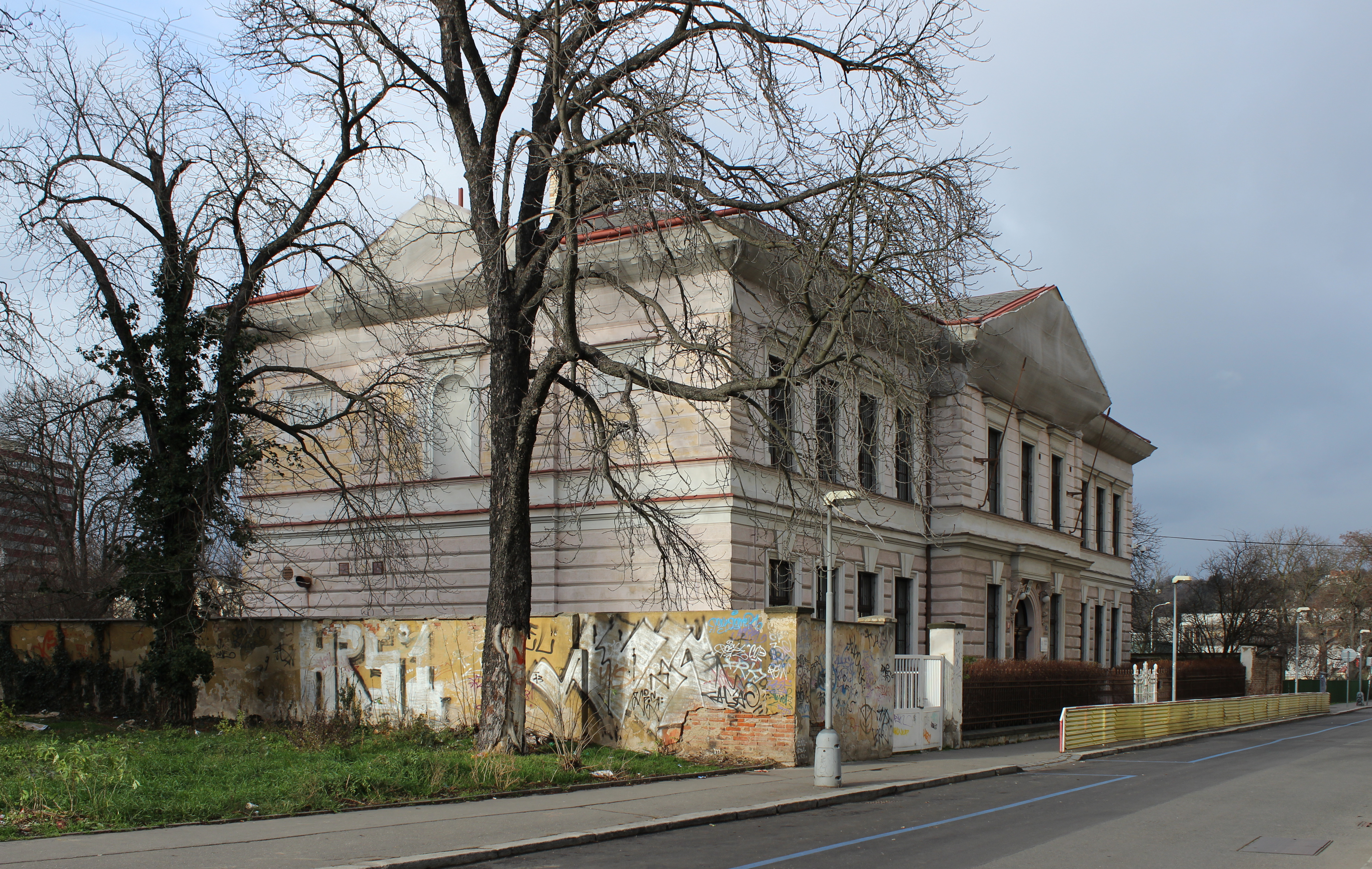 Pohled na Bratrskou školu v Holešovicích od jihovýchodu, Rajská 300/3.